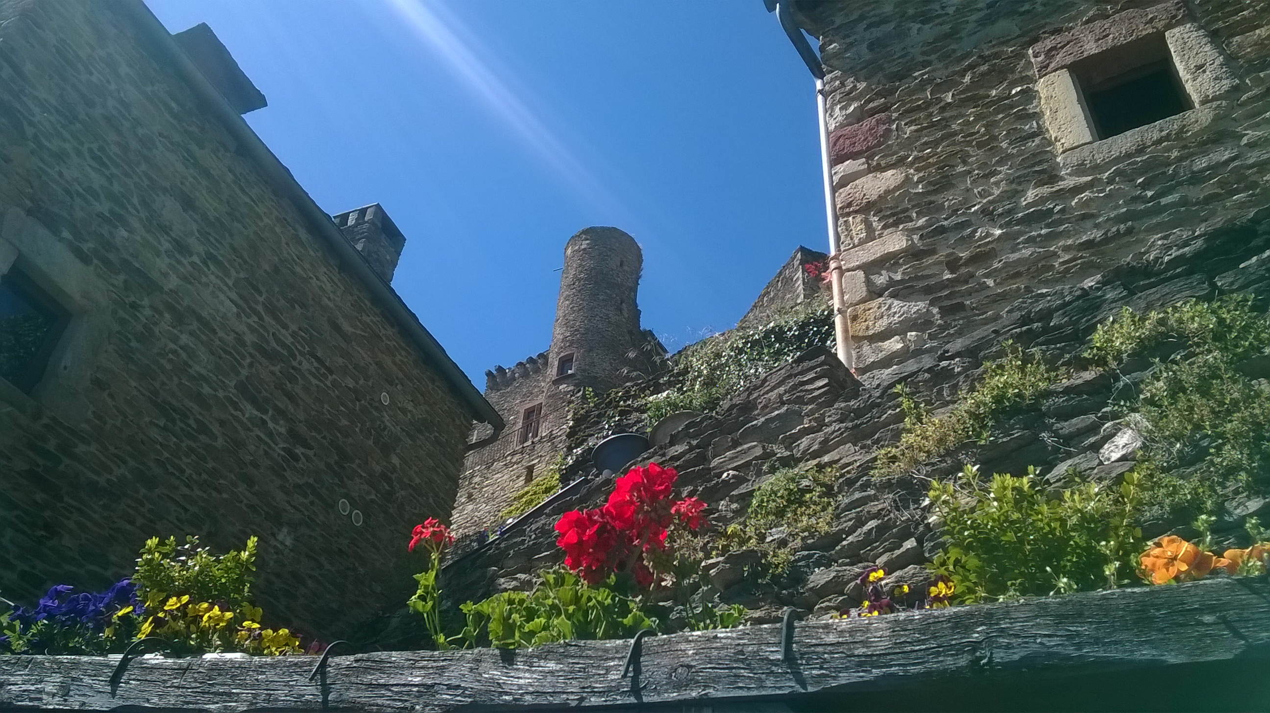 Vue sur le château de Belcastel depuis les calades (petite rue aux pierres calées)